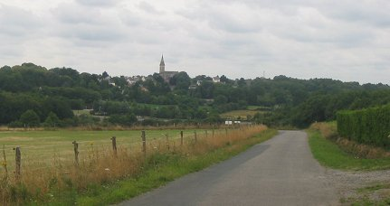 Le bourg de Fégréac vu du nord.